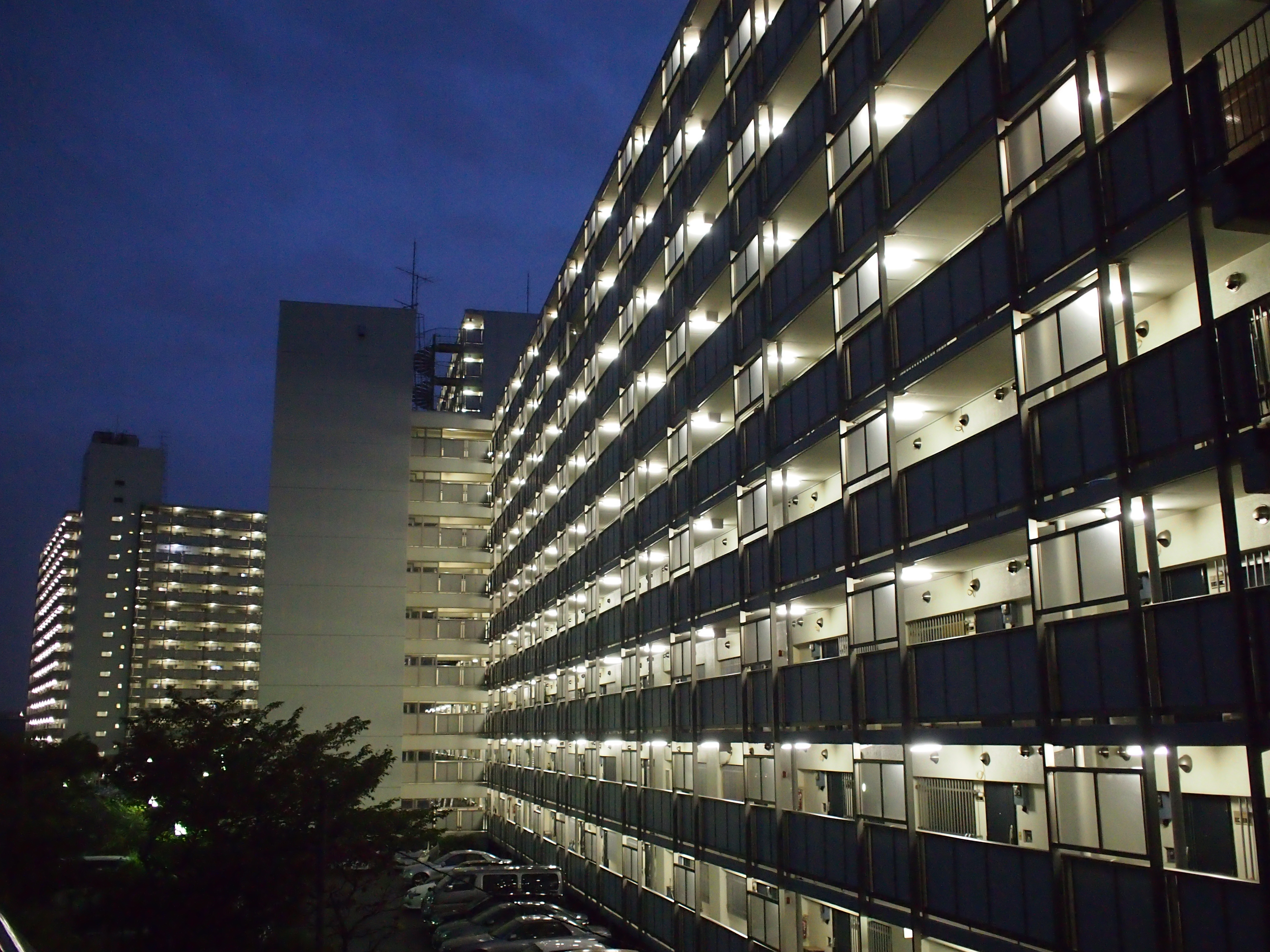 Ichinotsubo , Kawasaki